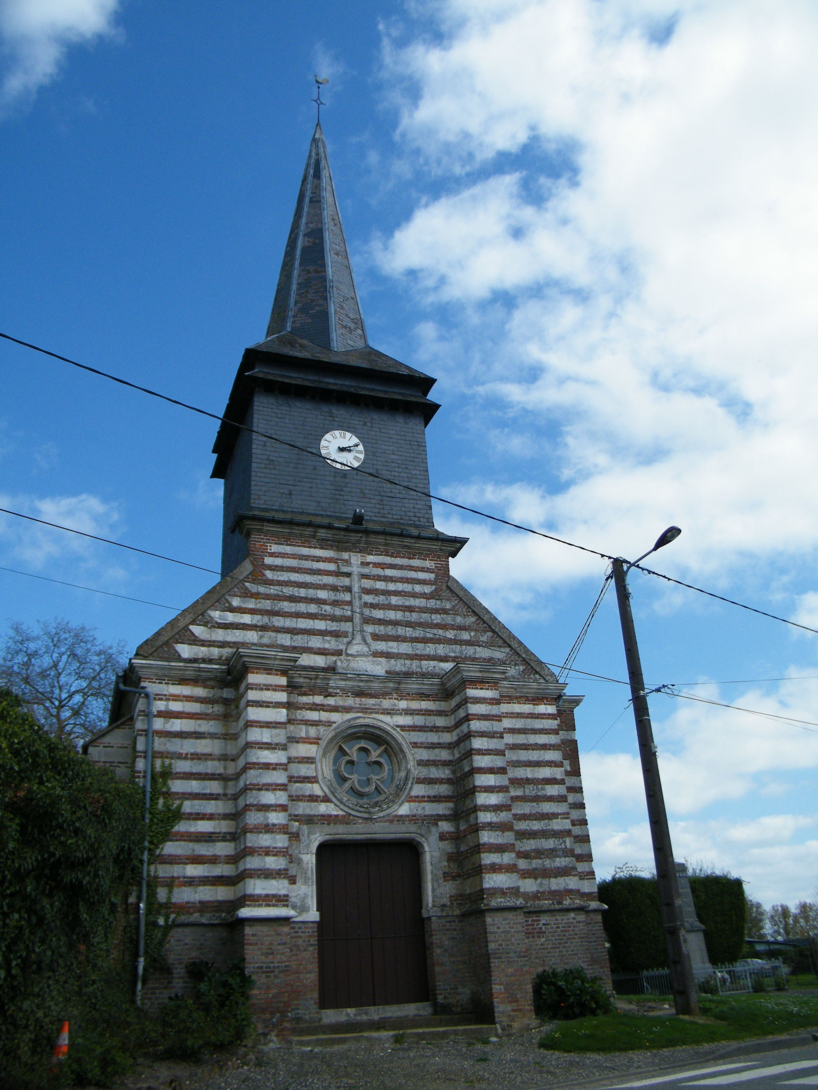 Le clocher de l'église Saint-Gilles, Fresneville, Somme, France.